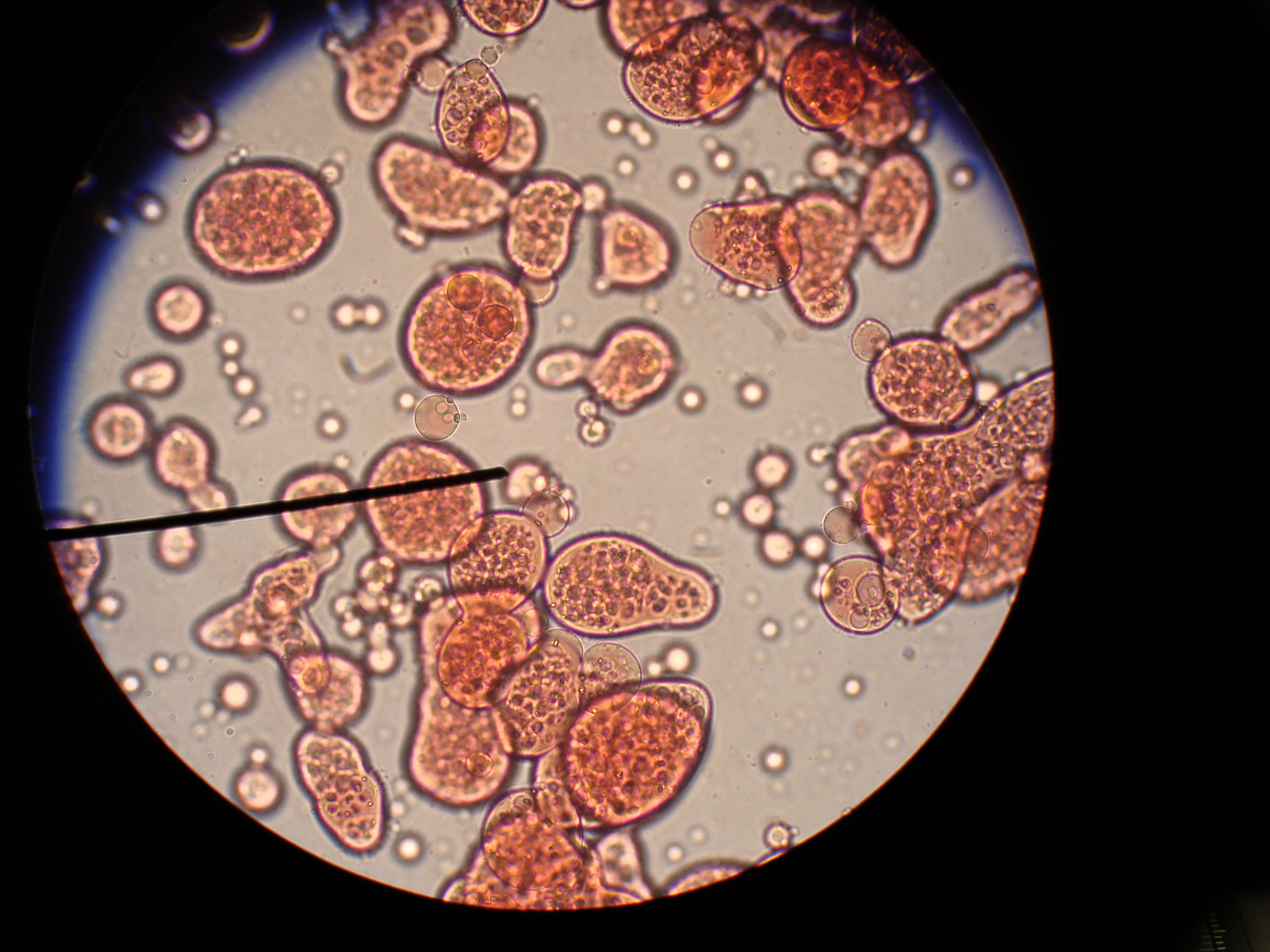 Fabrication de coacervats en laboratoire de chimie du Cégep de Drummondville, au Québec (Canada).